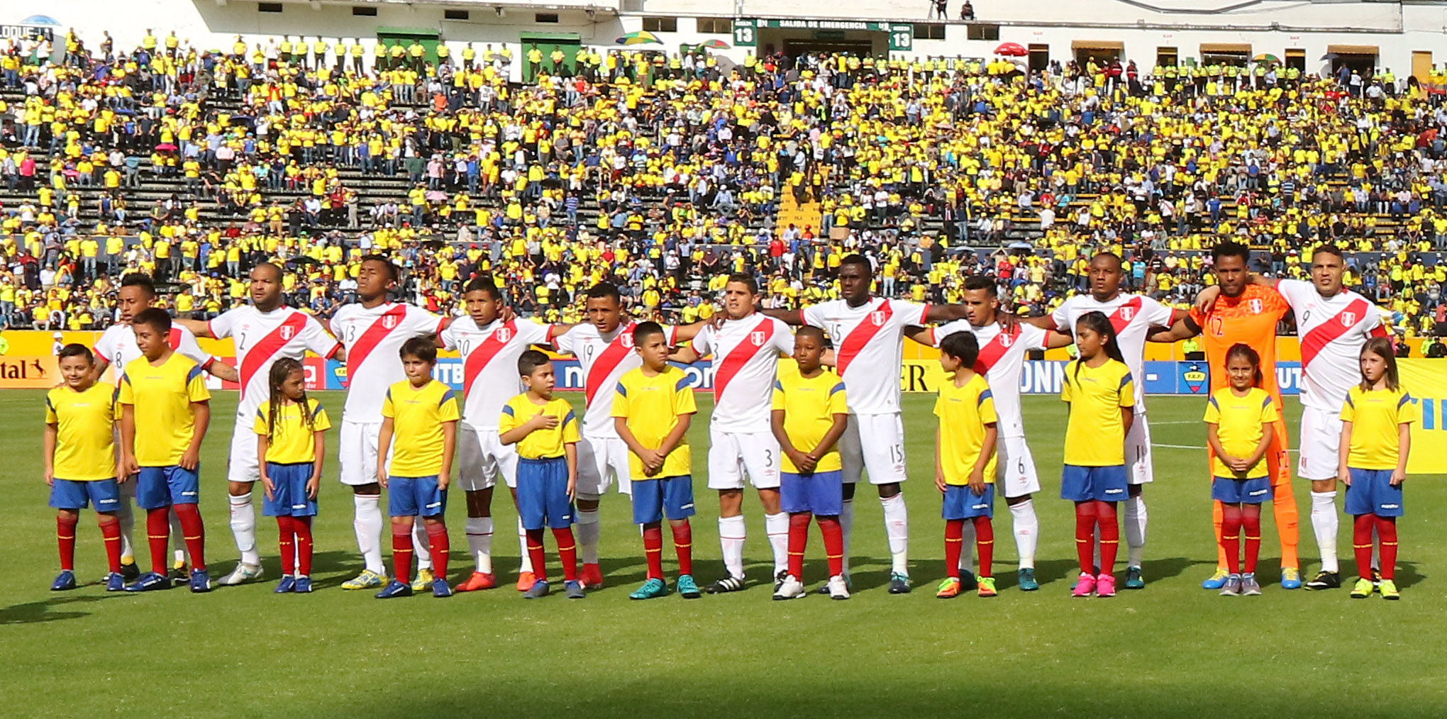 Quito 5 Sep (Andes).- Encuentro por eliminatorias Rusia 2018 entre Ecuador y Perú. Fotografías: Carlos Rodríguez/Andes.